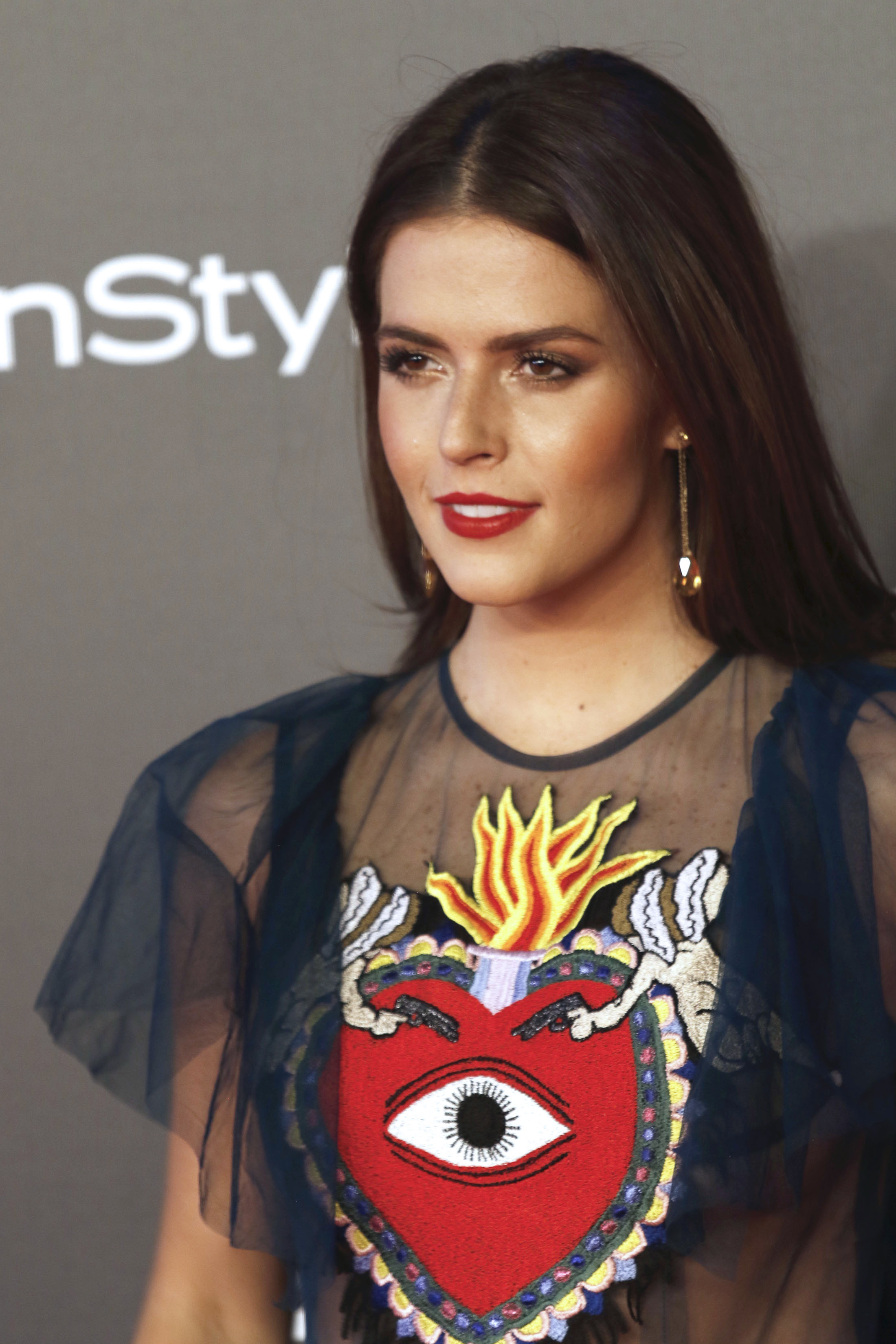 Miércoles 6 de diciembre de 2017En el Teatro de la Ciudad Esperanza Iris, se realizó la 4ª Entrega del Premio Iberoamericano de Cine, Fenix, previo a la ceremonia, nominados, conductores, presentadores y elencos, desfilaron por la alfombra roja.Fotografía: Milton Martínez / Secretaría de Cultura CDMX